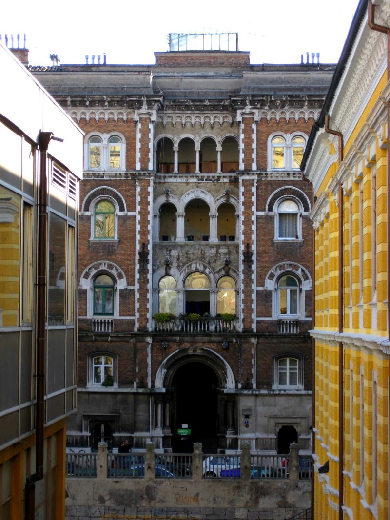 "Casa Veneziana" u ulici Dolac № 7, Rijeka